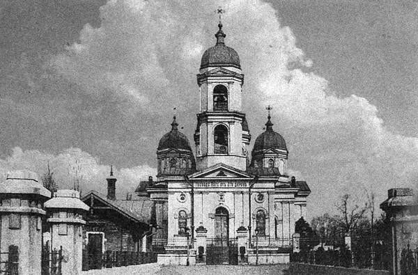 Вигляд Олексіївської церкви у 19-му столітті